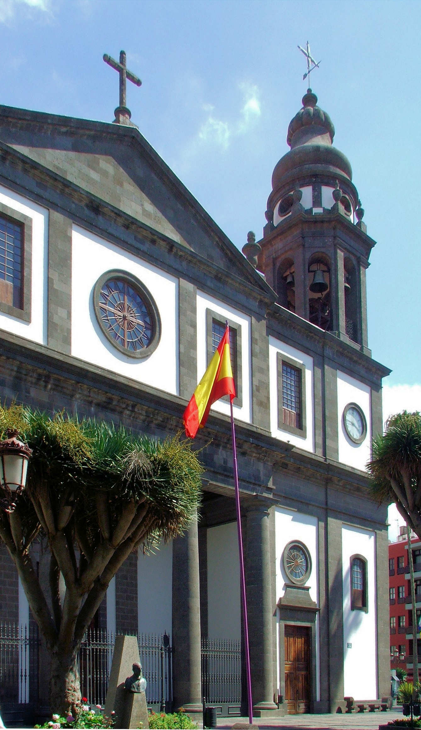 Fachada de la Iglesia Catedral La Laguna